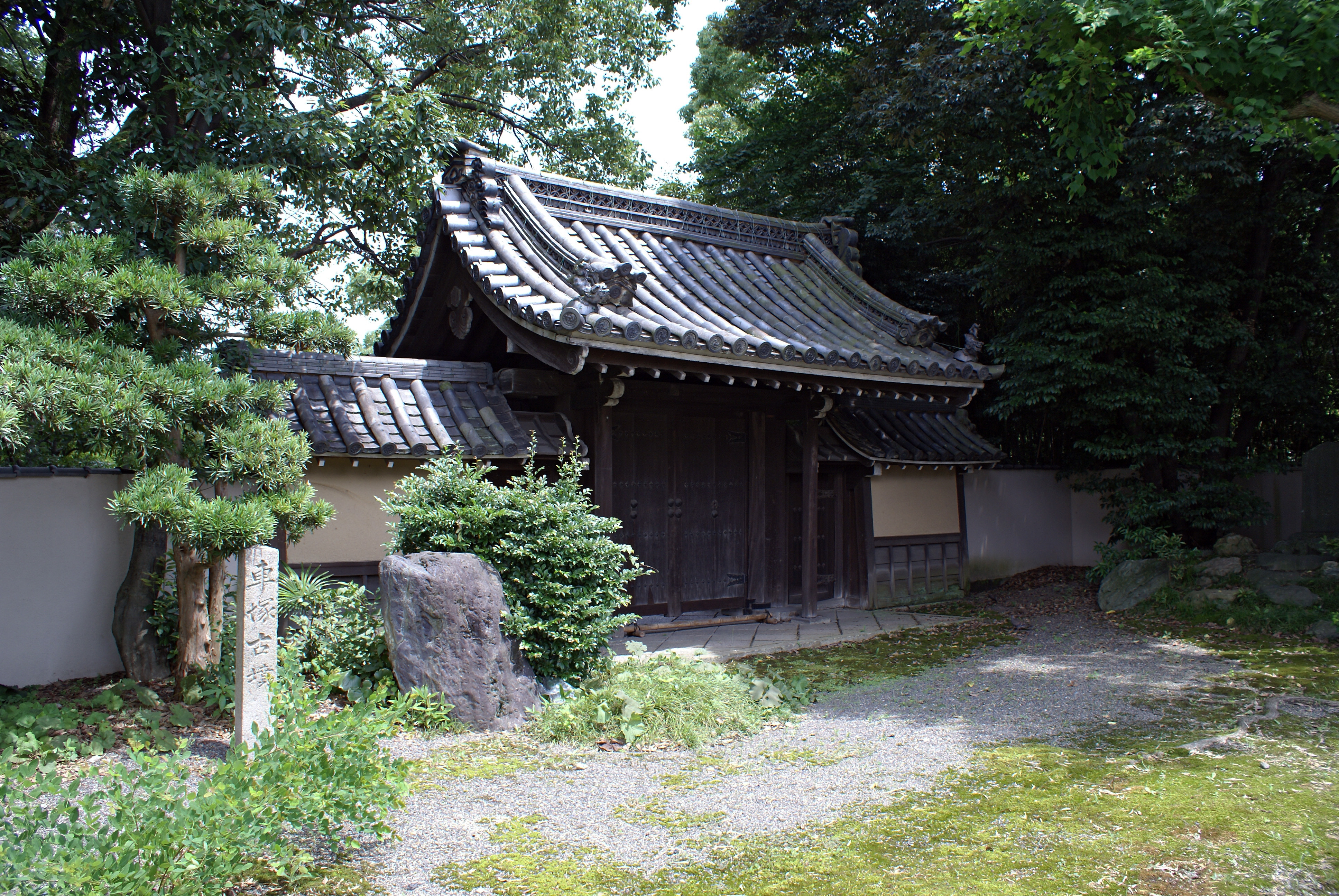 Shokado in Yawata, Kyoto, Japan